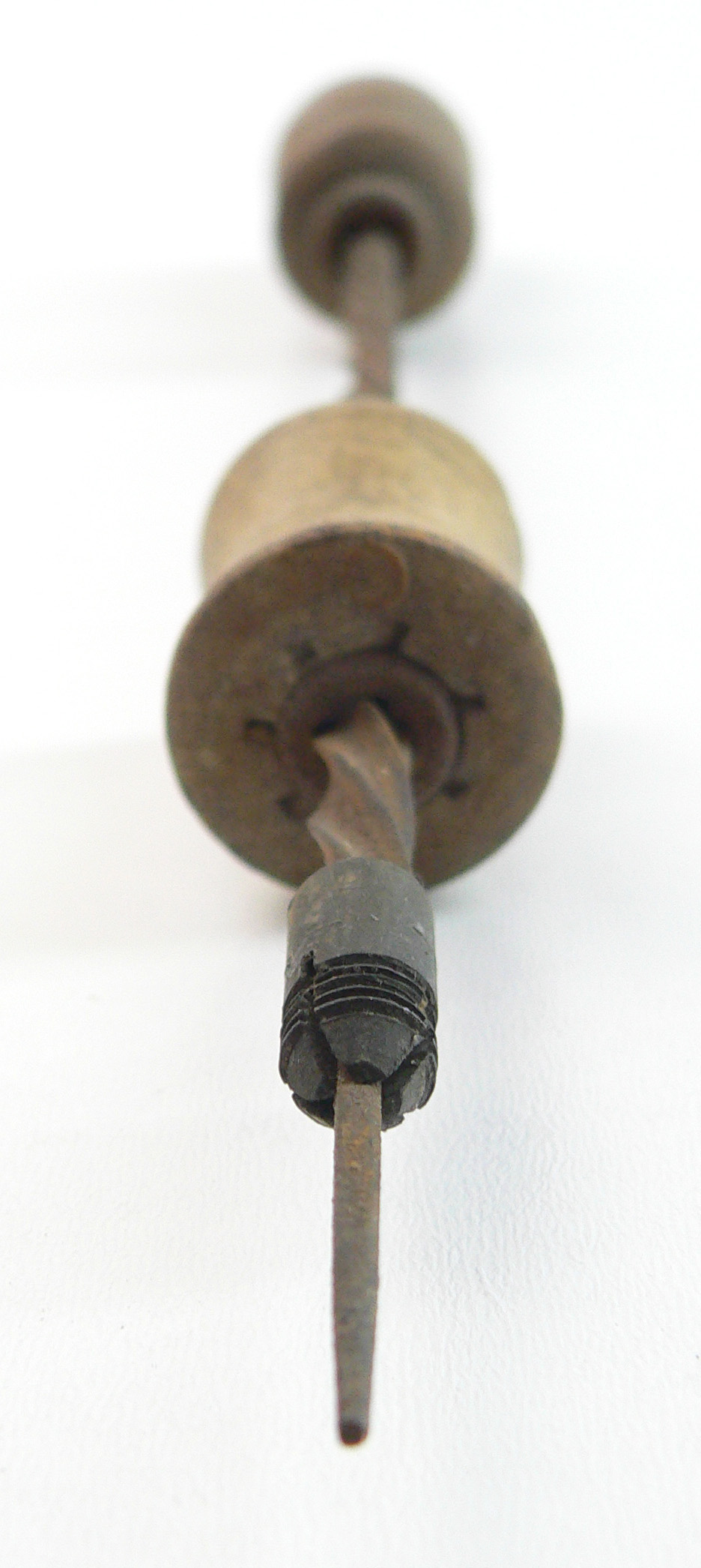 Spitze und Halterung eines Drillbohrers